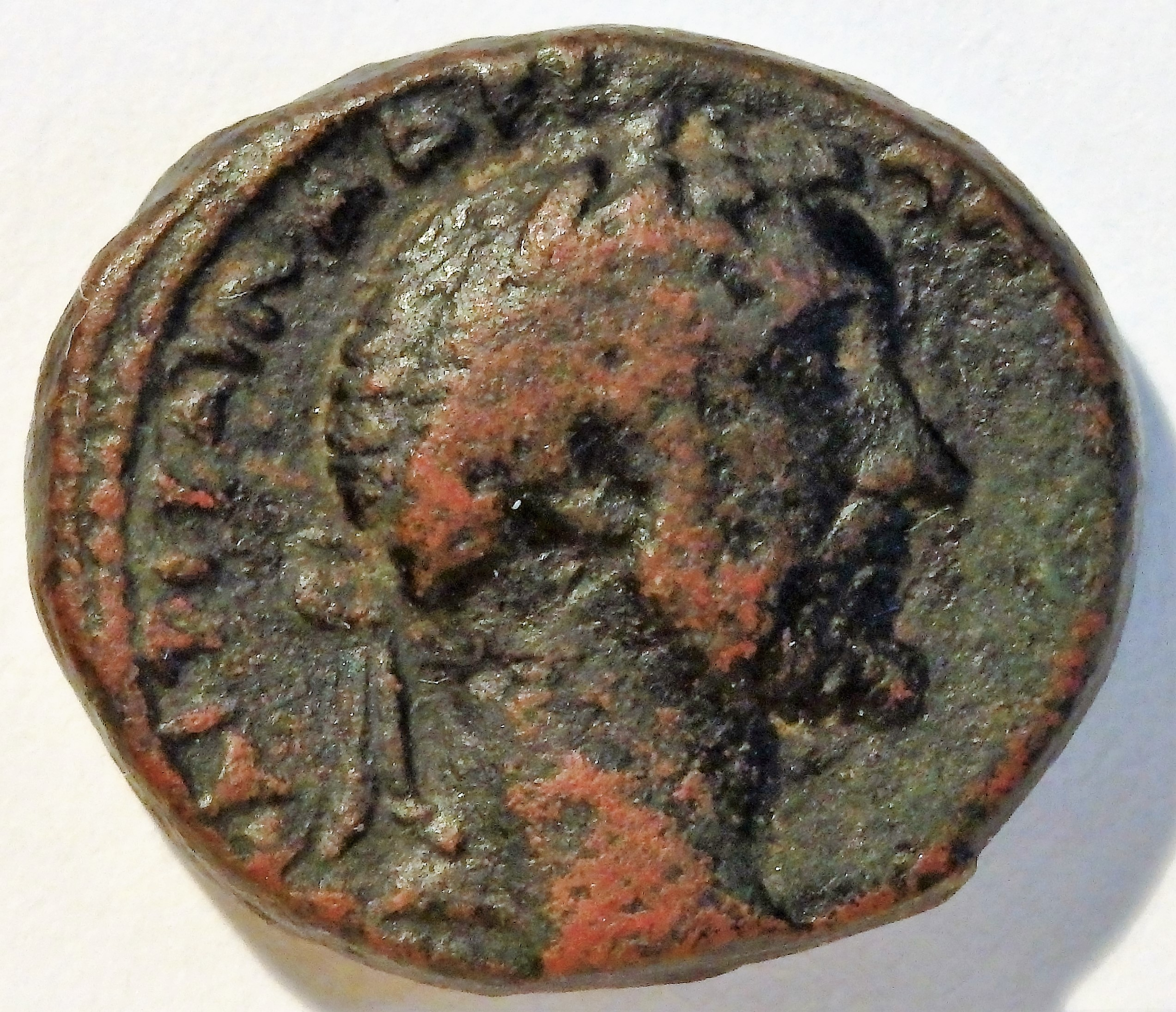 Porträtseite der Münze mit Antoninus Pius, vergleiche BMC 7-11